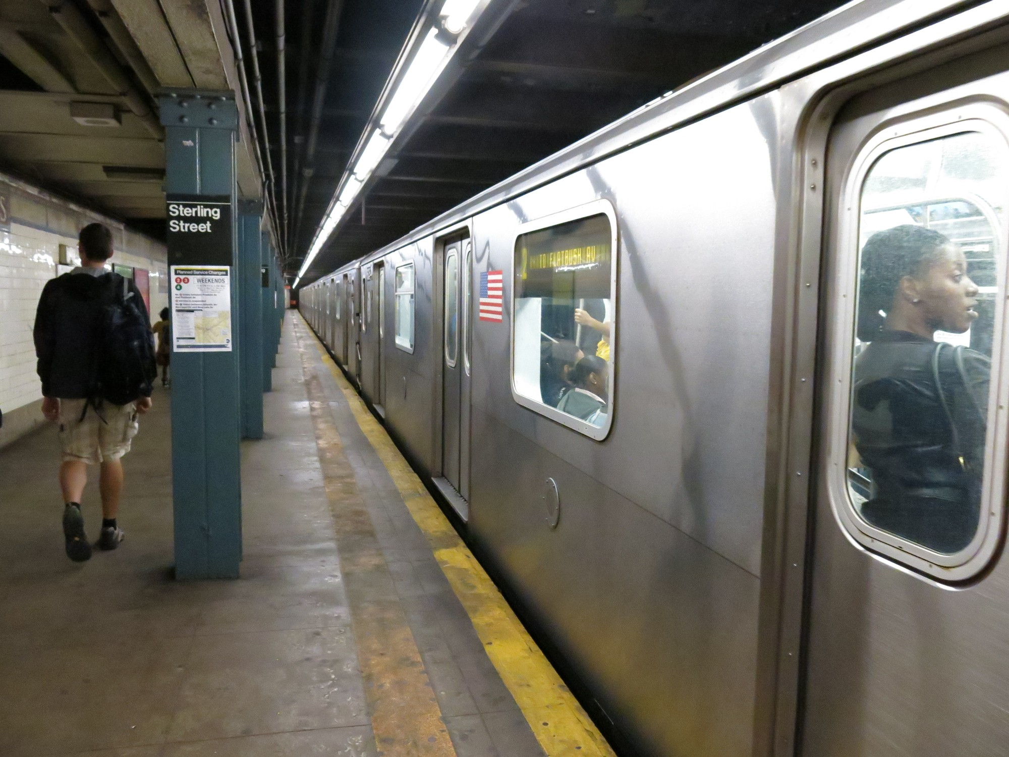 NYC's metro